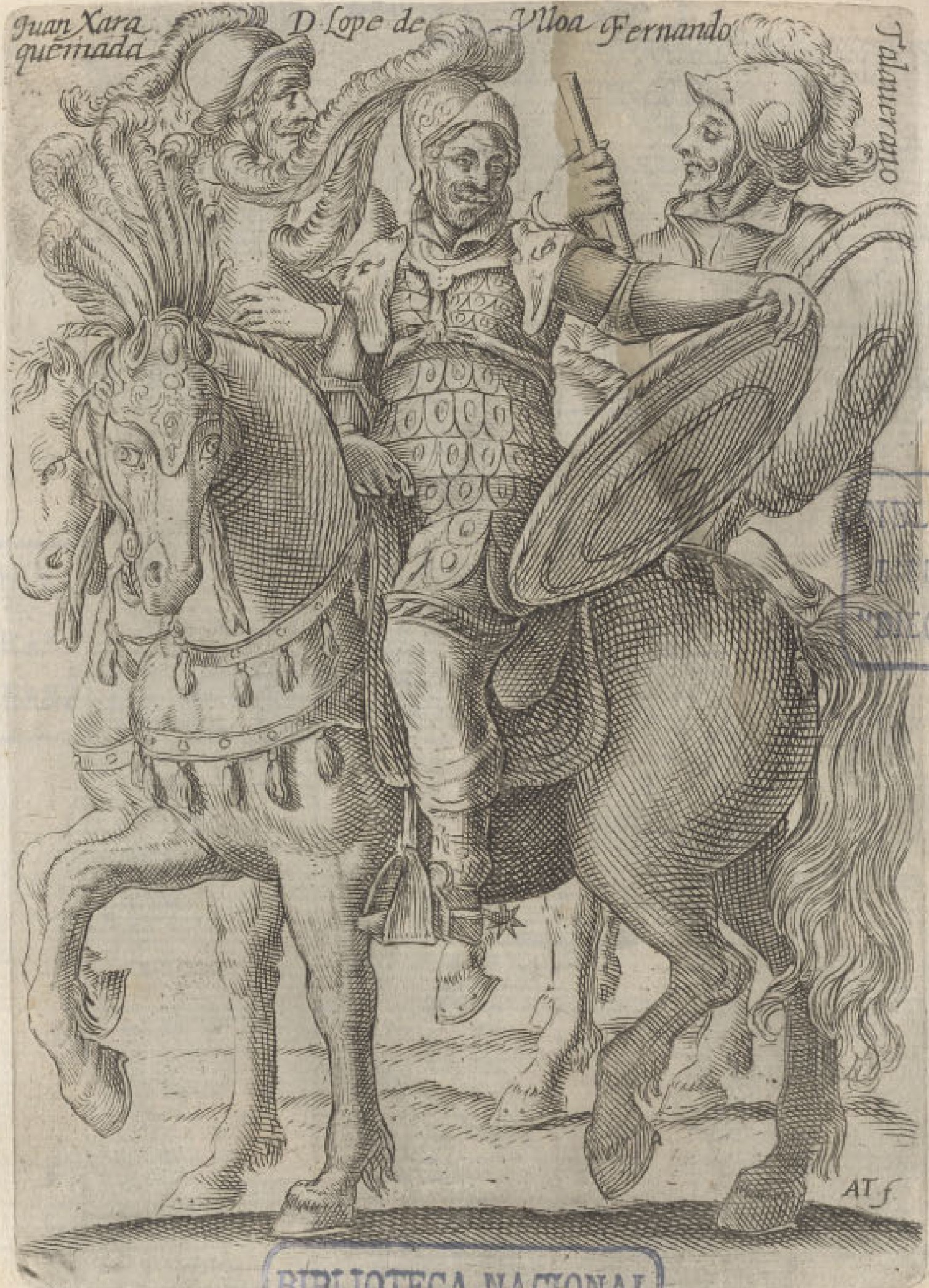 Juan Jaraquemada, Lope de Ulloa y Fernando Talaverano: spaniards governators of Chile // gobernadores españoles de Chile